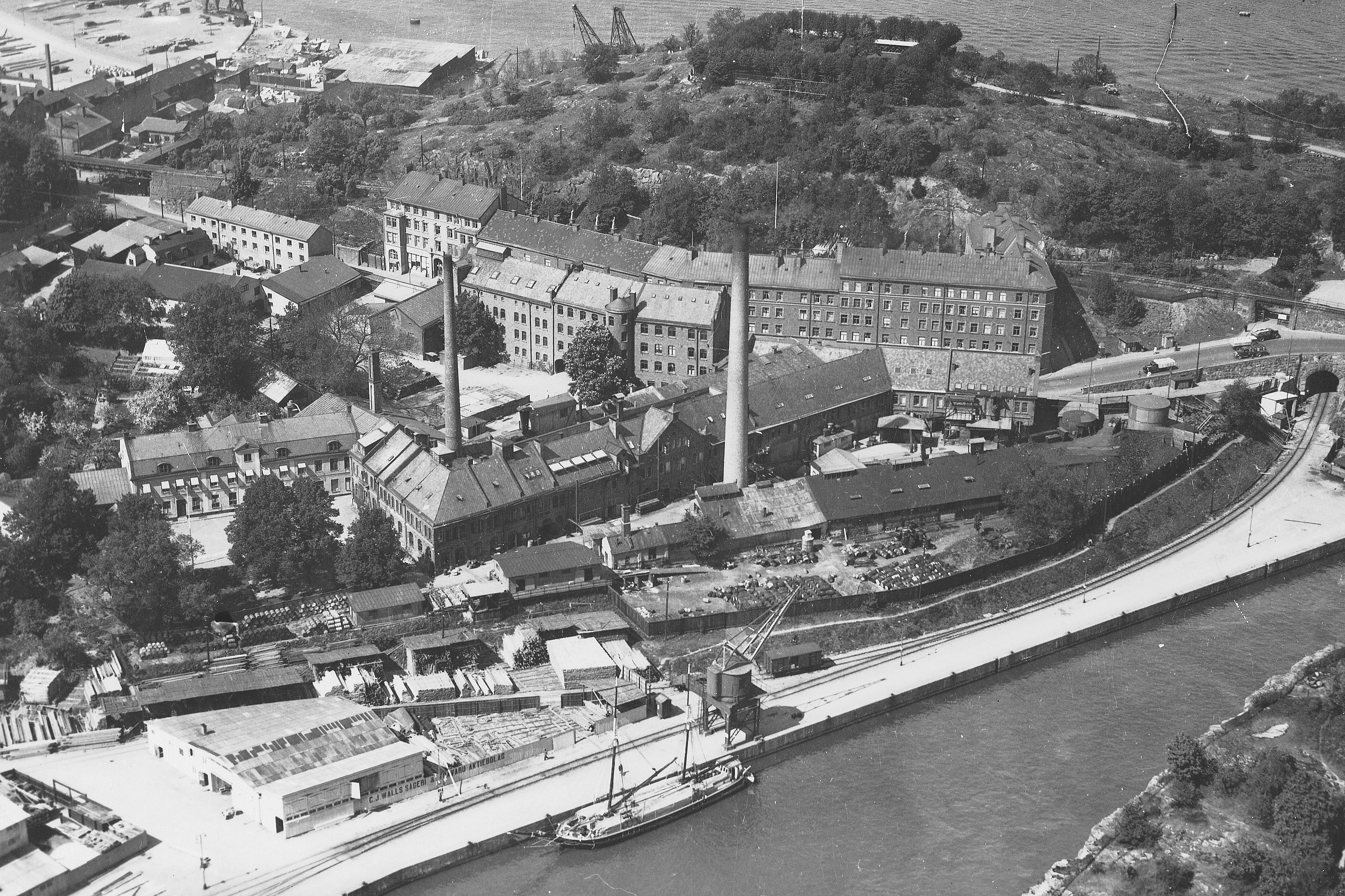 Flygfoto över Liljeholmens stearinfabrik på Södermalm